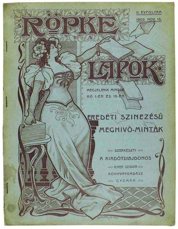 A Röpke Lapok című újság borítója, Kner Izidor kiadványa